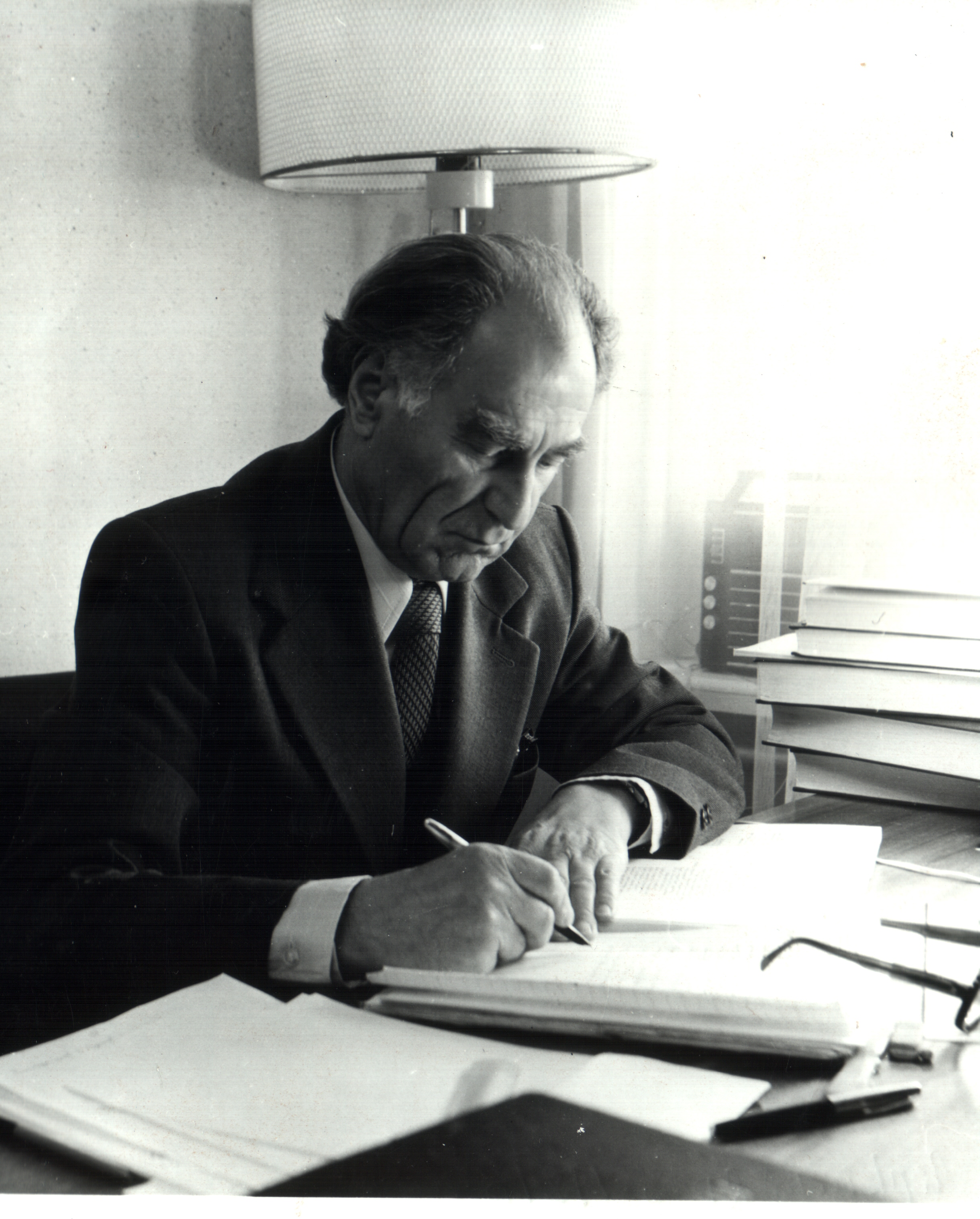 Հակոբ Հմայակի Հակոբյան